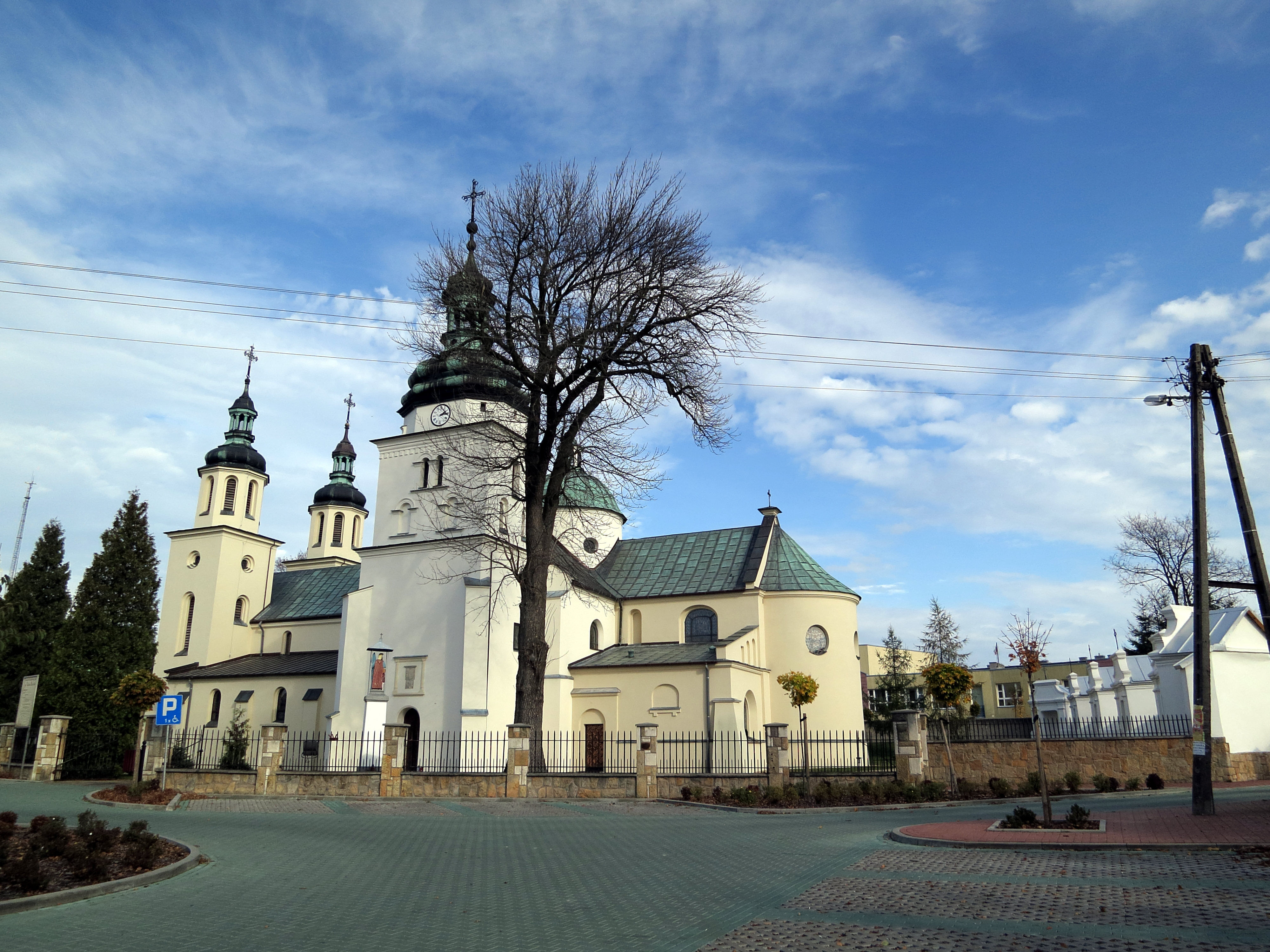 Dąbrowa Zielona, kościół parafialny pw. św. Jakuba, 1554, 1908-1911